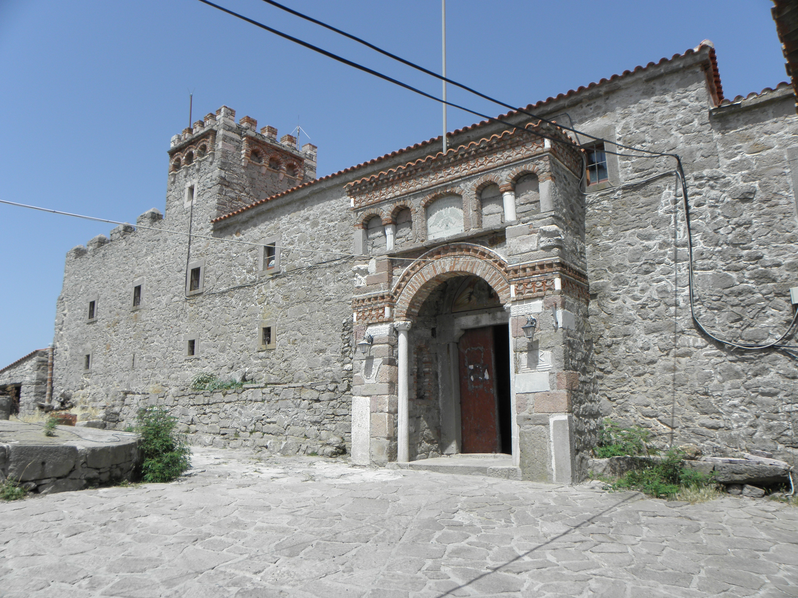 Klášter Ipsalou, Lesbos